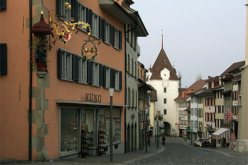 Untertor und Unterstadt von Sursee